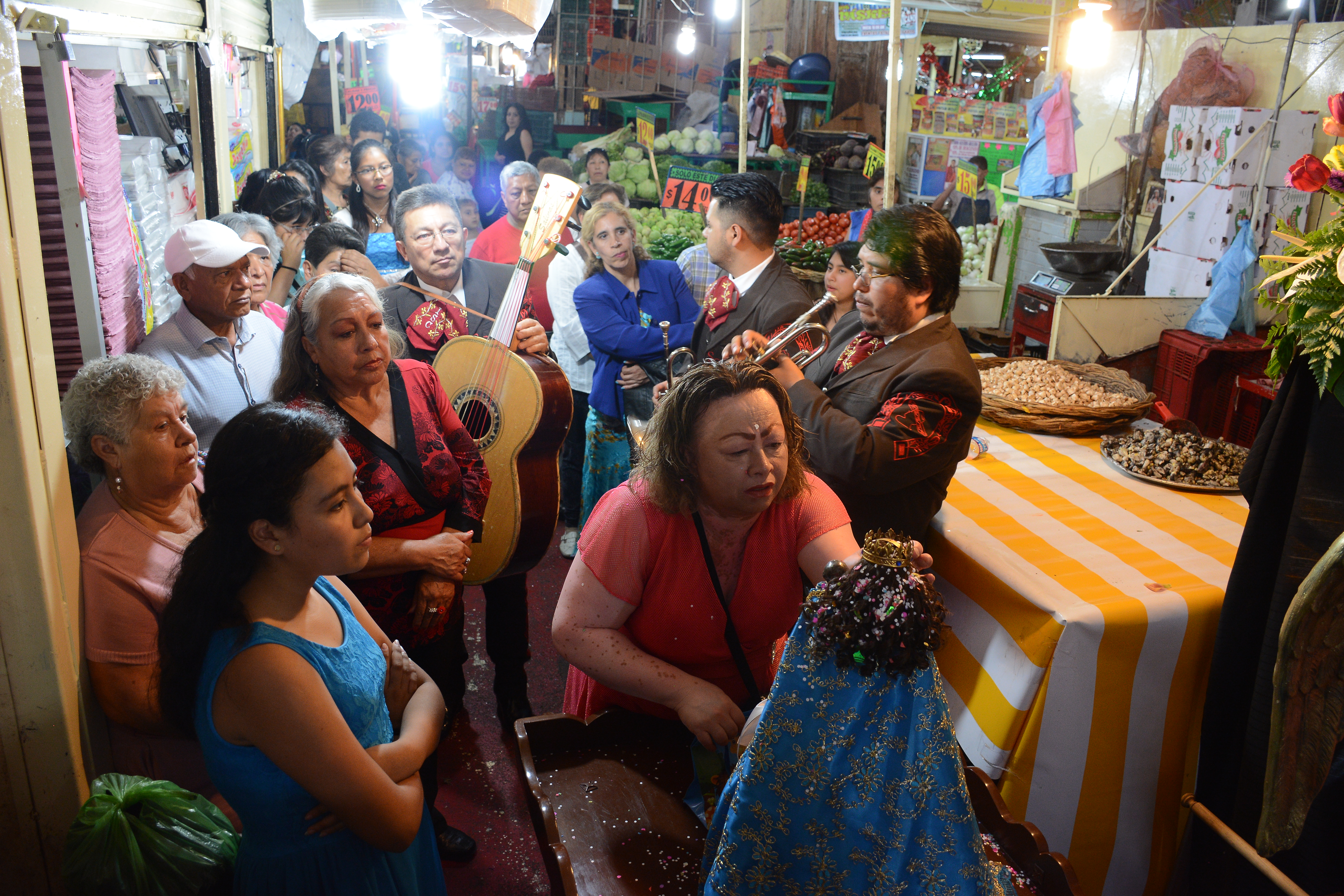 60 años de resistir temblores, incendios, de alimentar cientos de hogares mexicanos, 60 aniversario del mercado de la Merced. Después del ultimo incendio registrado en 2013 los locatarios del mercado decidieron seguir luchando por mantener el mercado minorista más grande de la Ciudad de México. Aquí una foto de la virgen de la Merced dentro de uno de los locales de la nave mayor.